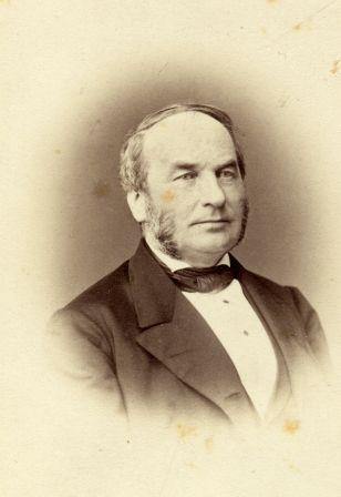 Portrait of Norwegian deaf teacher Fredrik Glad Balchen